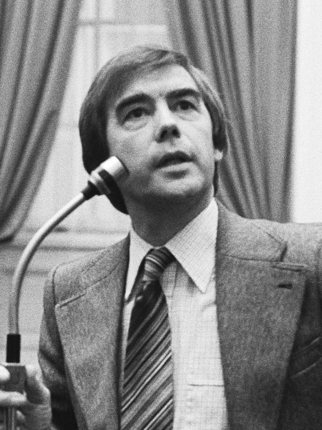 CDA woordvoerder Ton Frinking aan het woord 7 november 1979